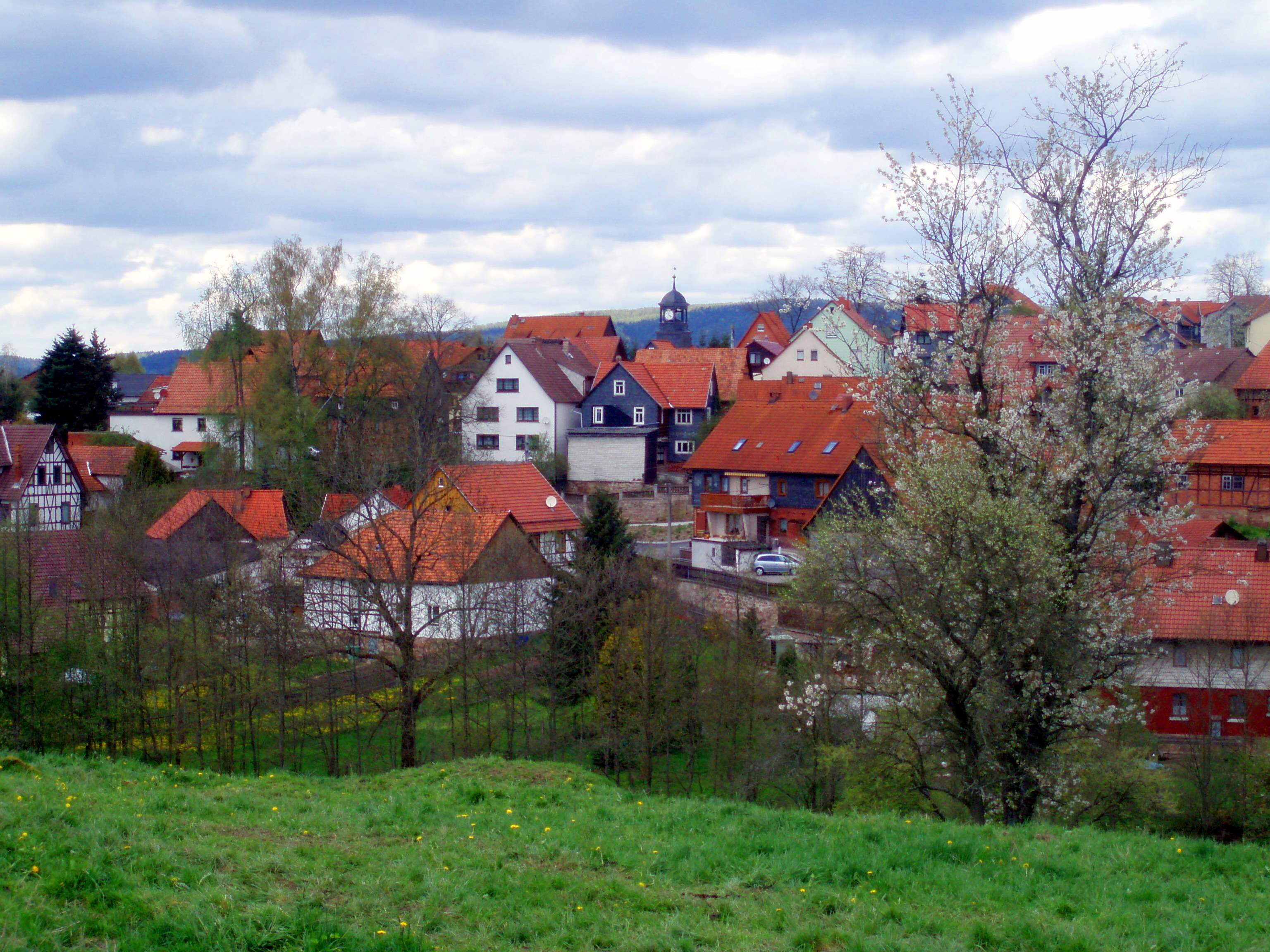 Blick auf Grimmelshausen